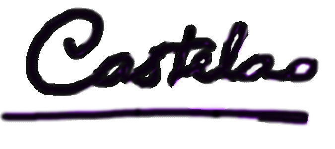 Sinatura Castelao grafo sobre oleo tipo chan, Rianxo Galiza Spain